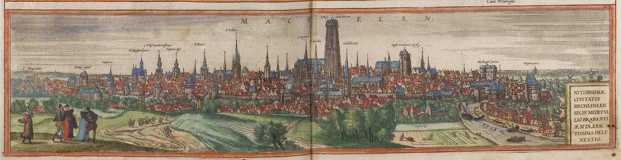 Mechelen